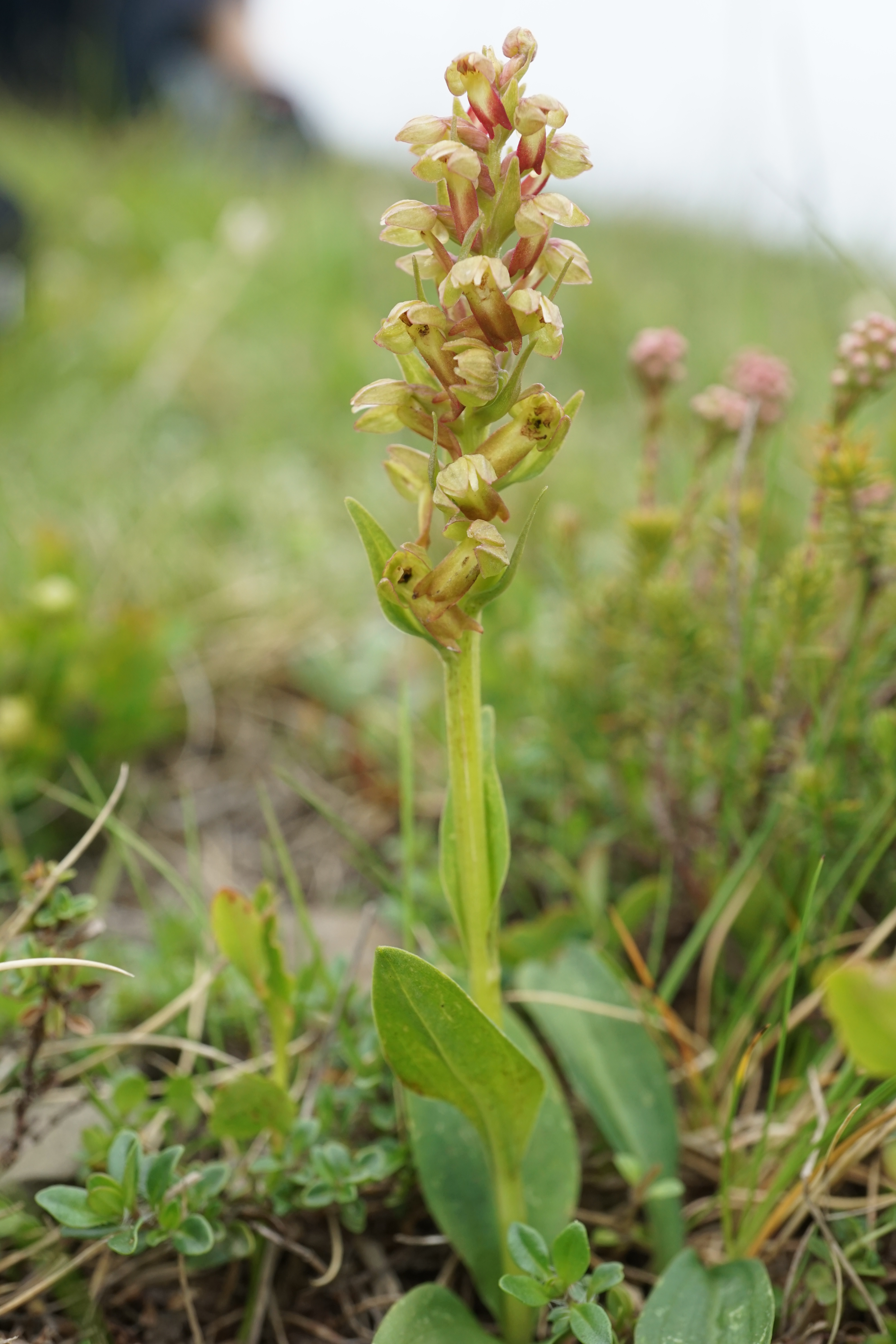 frog orchid grüne Hohlzunge